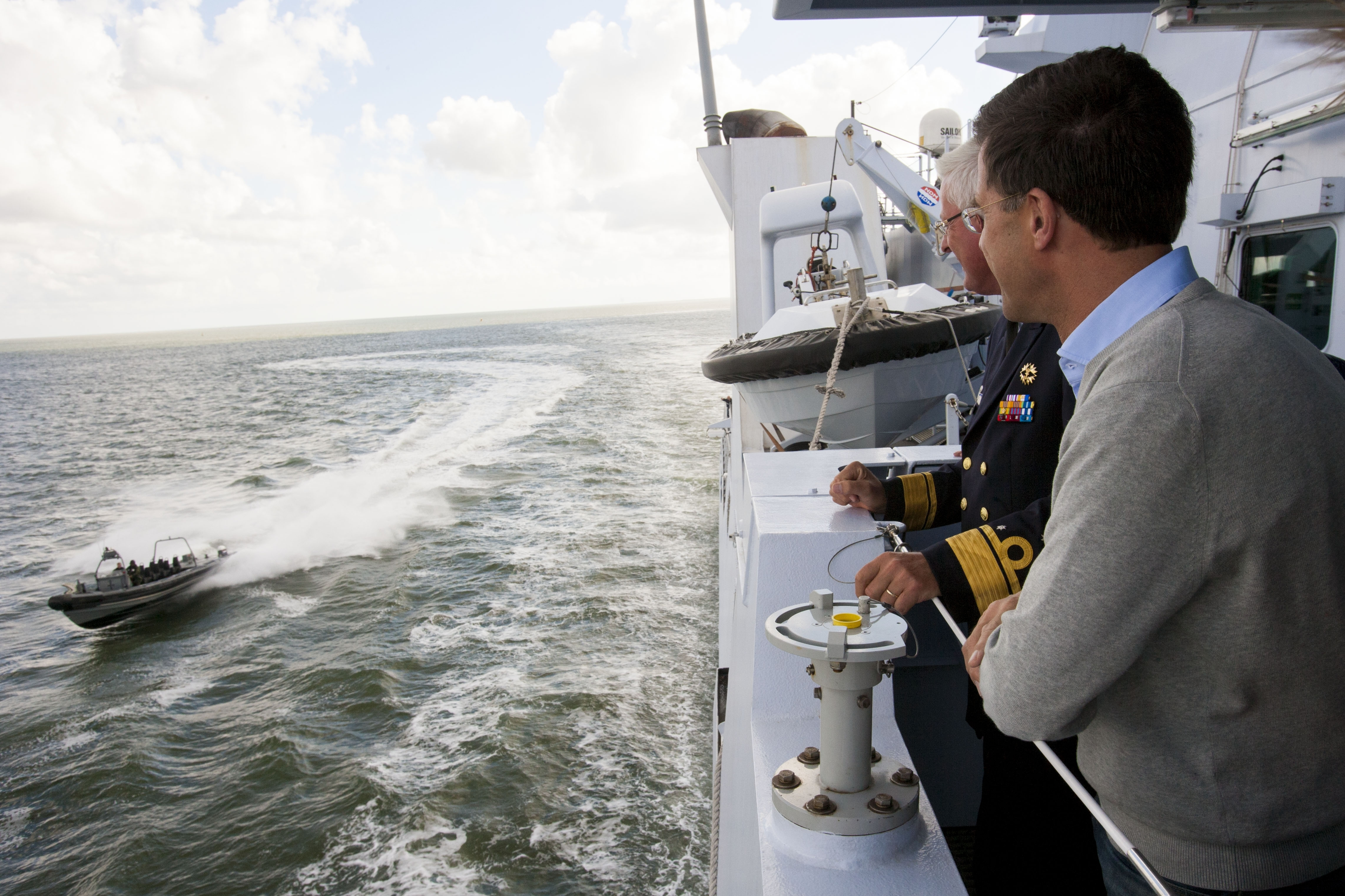 Minister-president Rutte viert met de bemanning van Zr.Ms. Zeeland en Zr.Ms. Walrus het 525-jarig jubileum van de Koninklijke Marine.